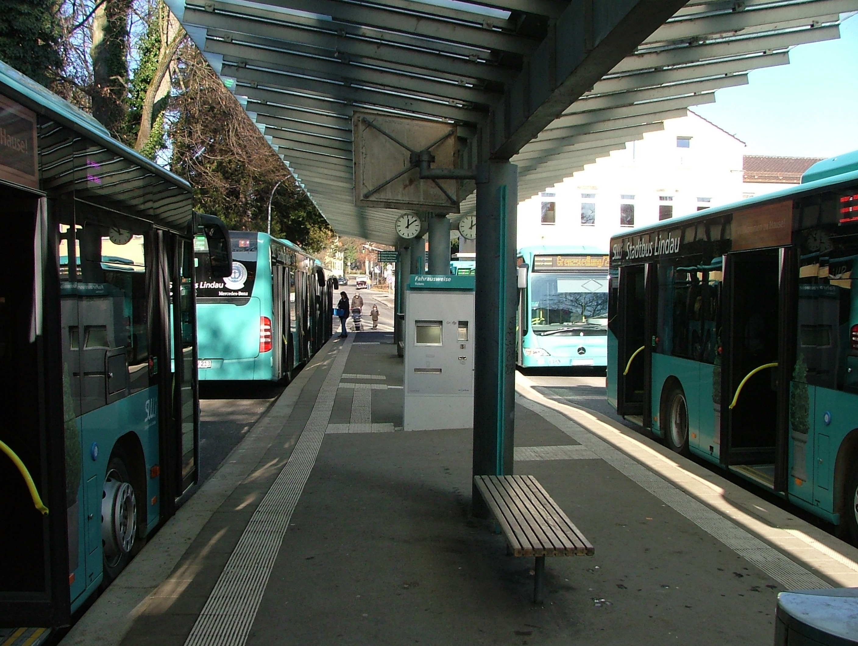 Busbahnhof